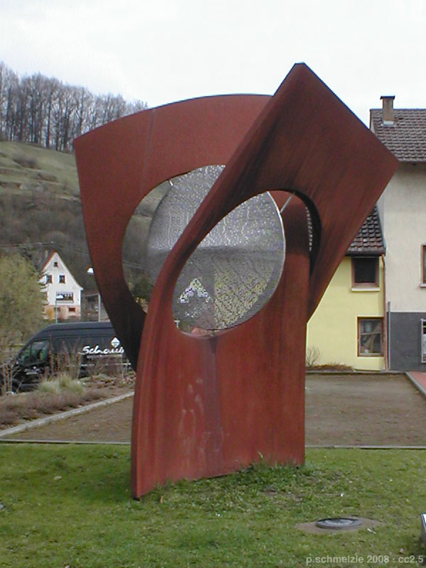 Plastik „Am Rande mittendrin“ des Bildhauers Darko Gol in Zaberfeld